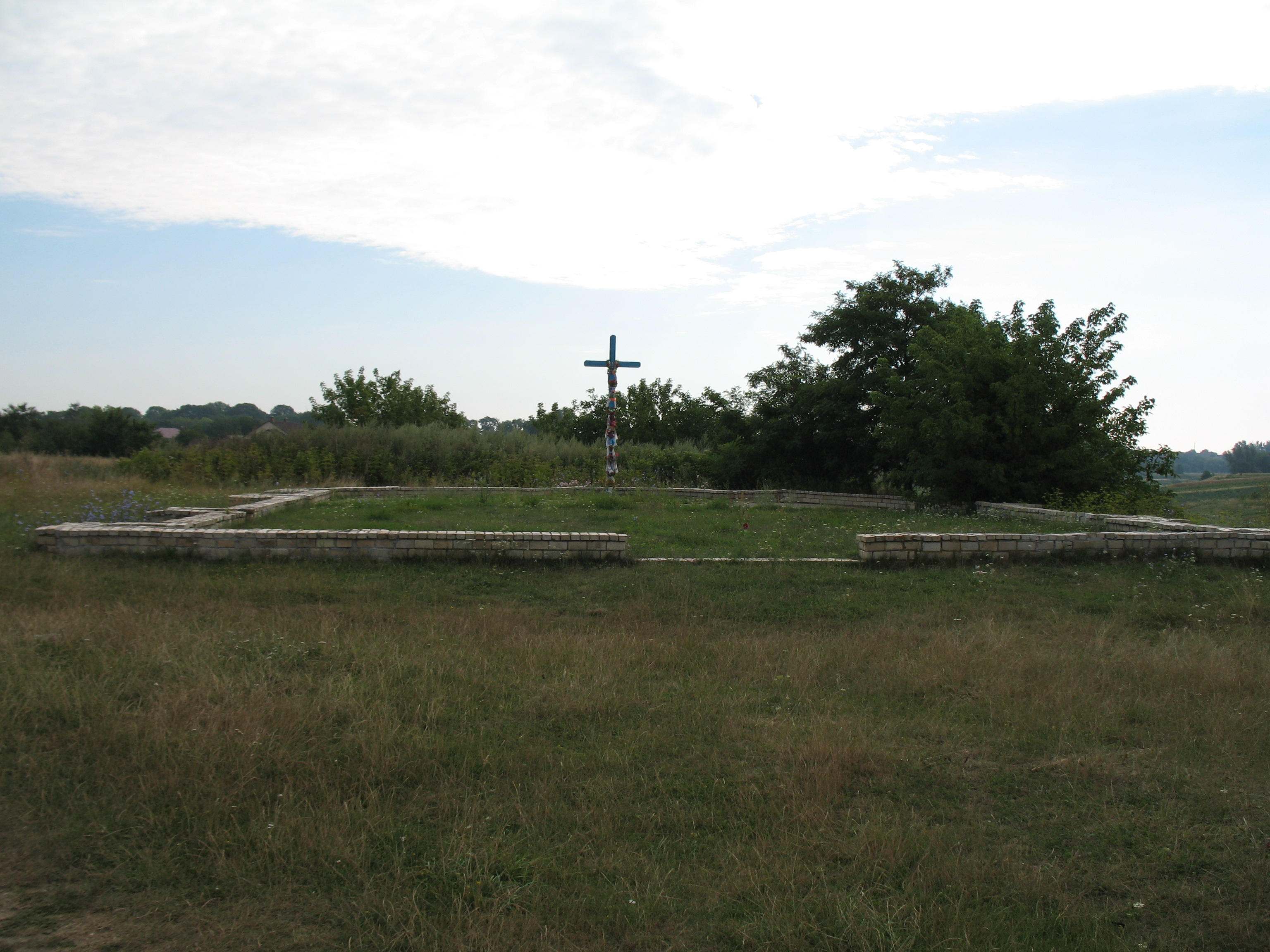 Володимир Волинський район. Село Федорівка. Стара кадетра. Вид з заходу